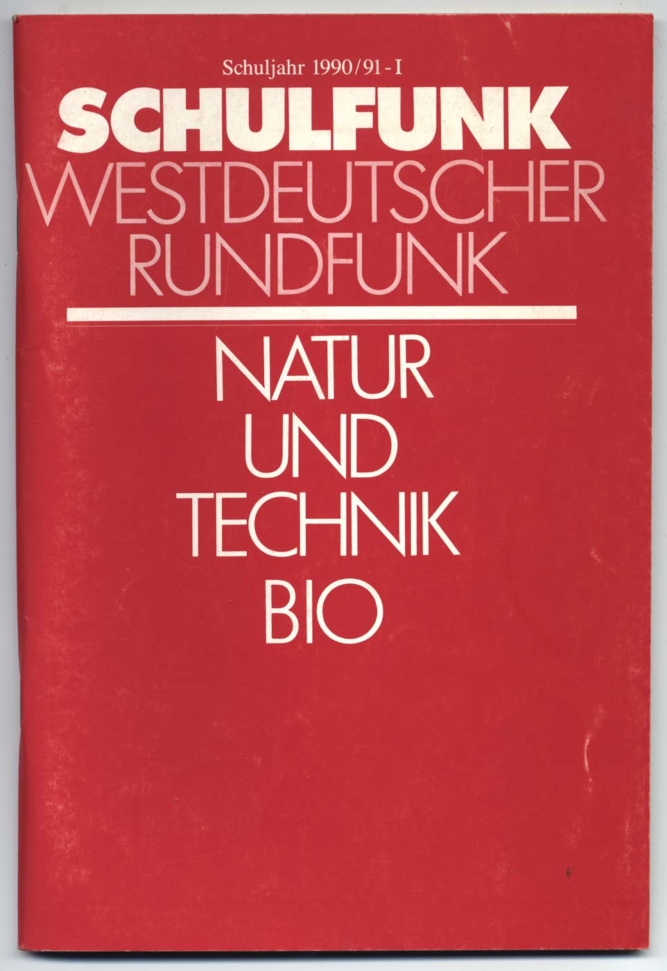 Deckblatt des Beihefts zum Schulfunkprogramm des Westdeutschen Rundfunks für das Jahr 1990. Der Unterrichtsschwerpunkt war Natur, Technik, Biologie.